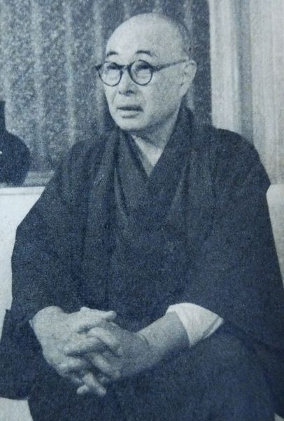 小川未明